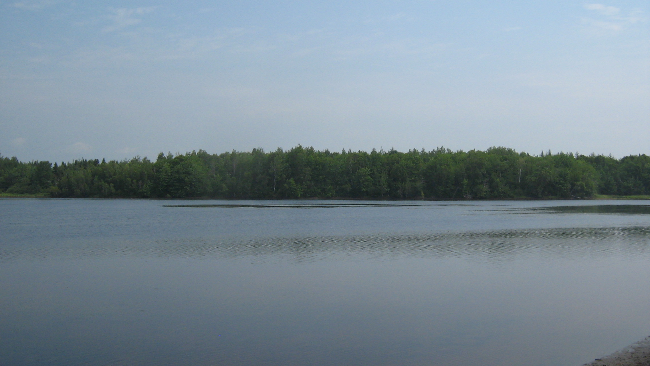 Baie de Kouchibouguac à partir du sentier Claire-Fontaine